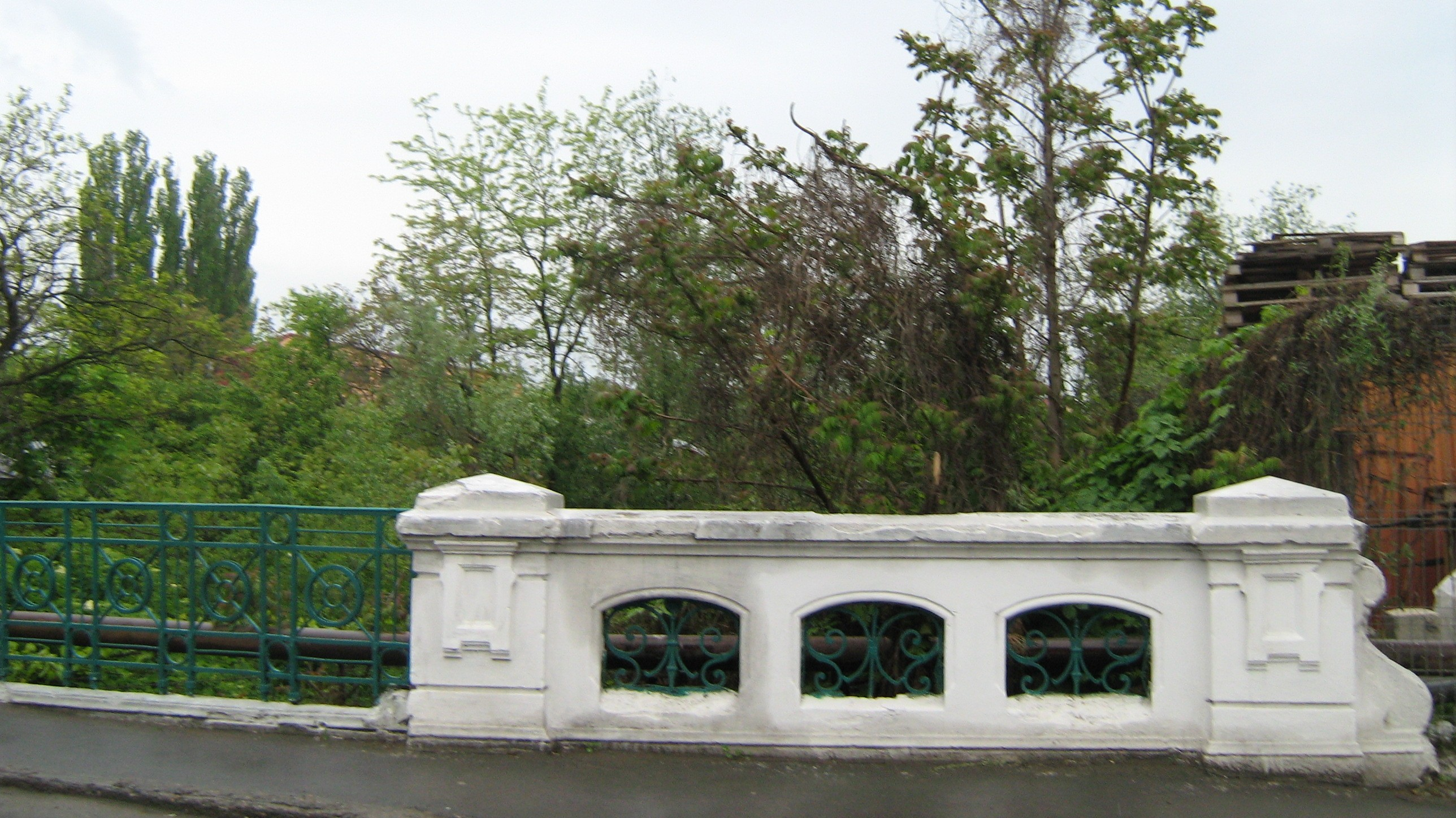 Podul Verde